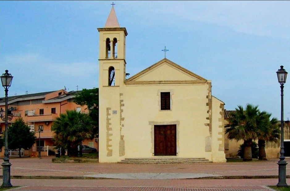 Chiesa di Santa Greca, Decimomannu